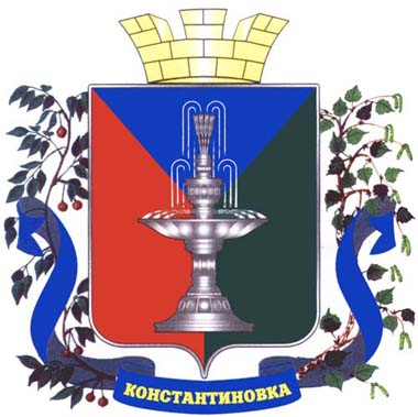 Герб города Константиновка